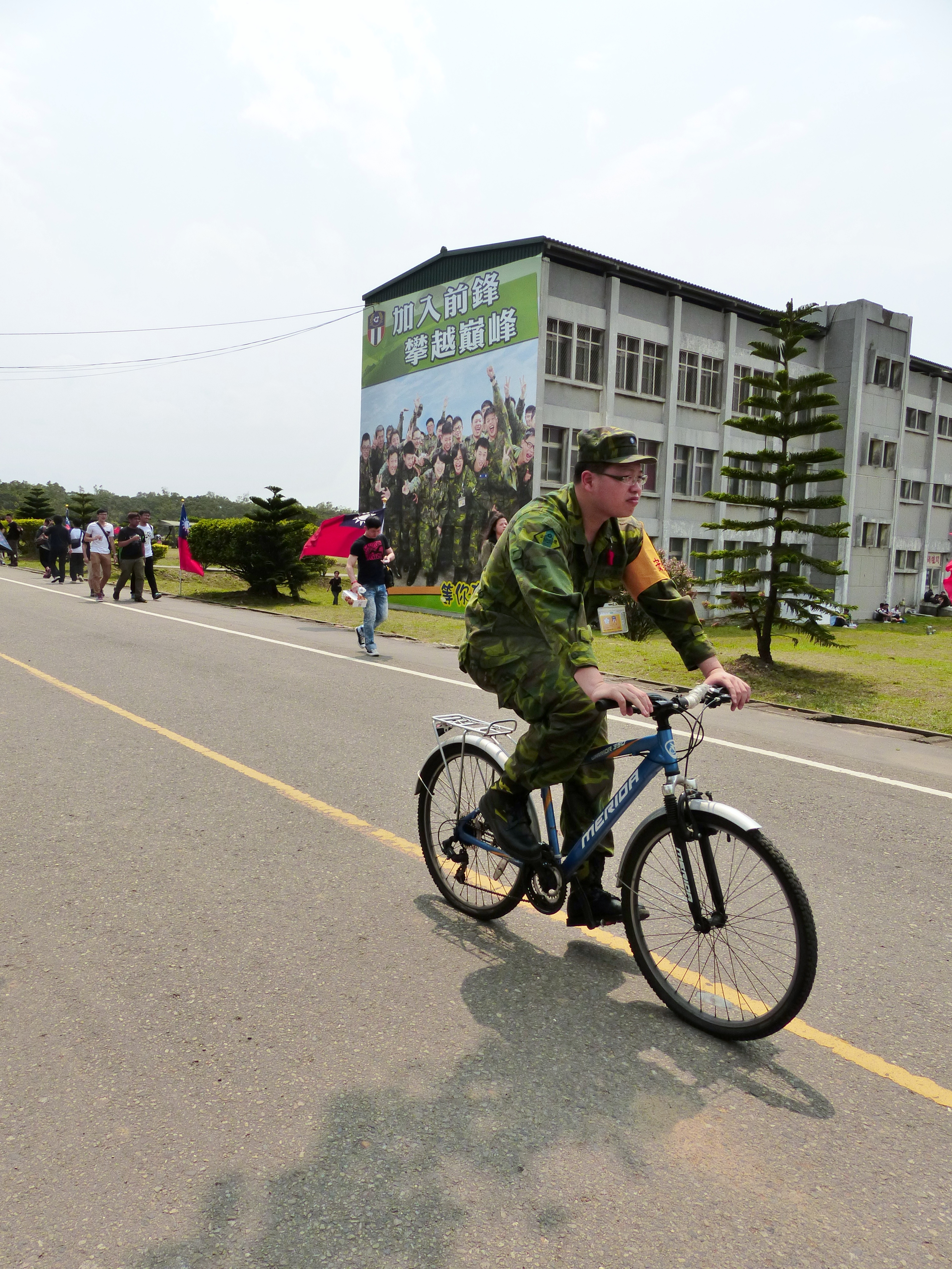 中文（台灣）: 2014年陸軍湖口營區開放活動，安全士官騎美利達腳踏車巡視營區。